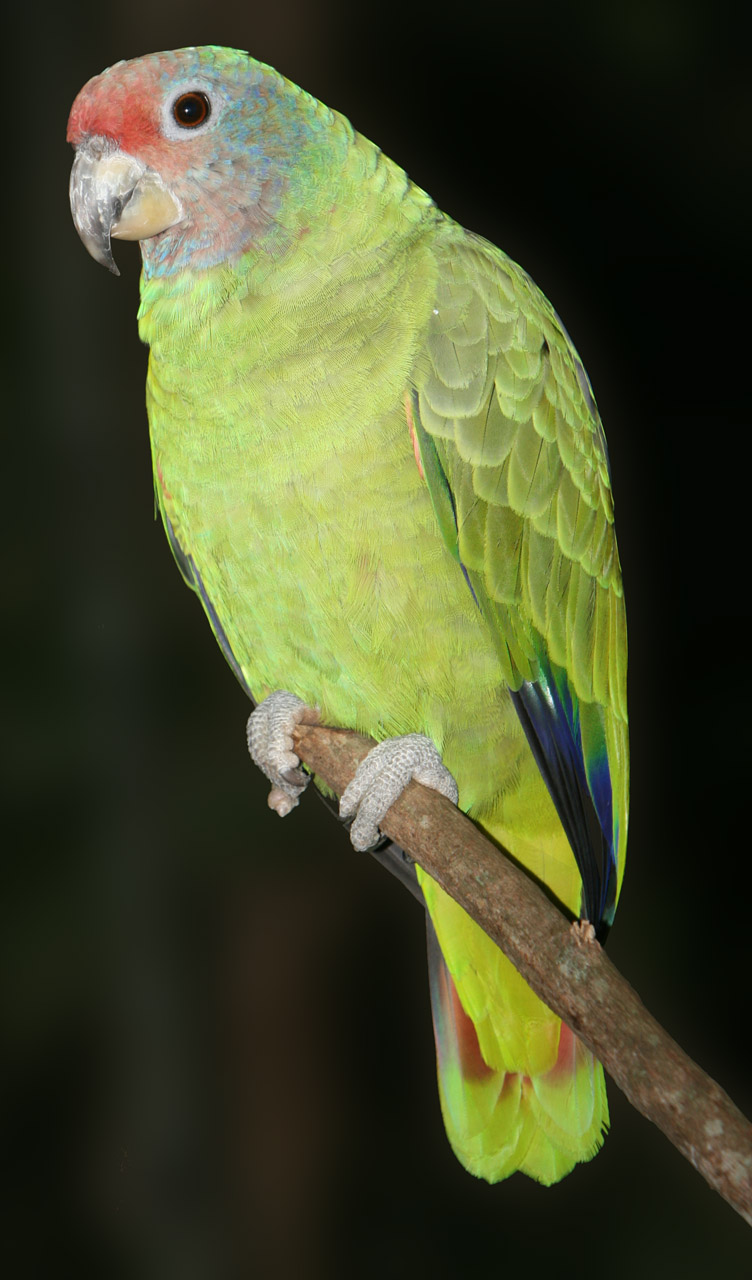 Red-tailed Amazon (Amazona brasiliensis) Parque das Aves, Foz do Iguaçu, Brazil